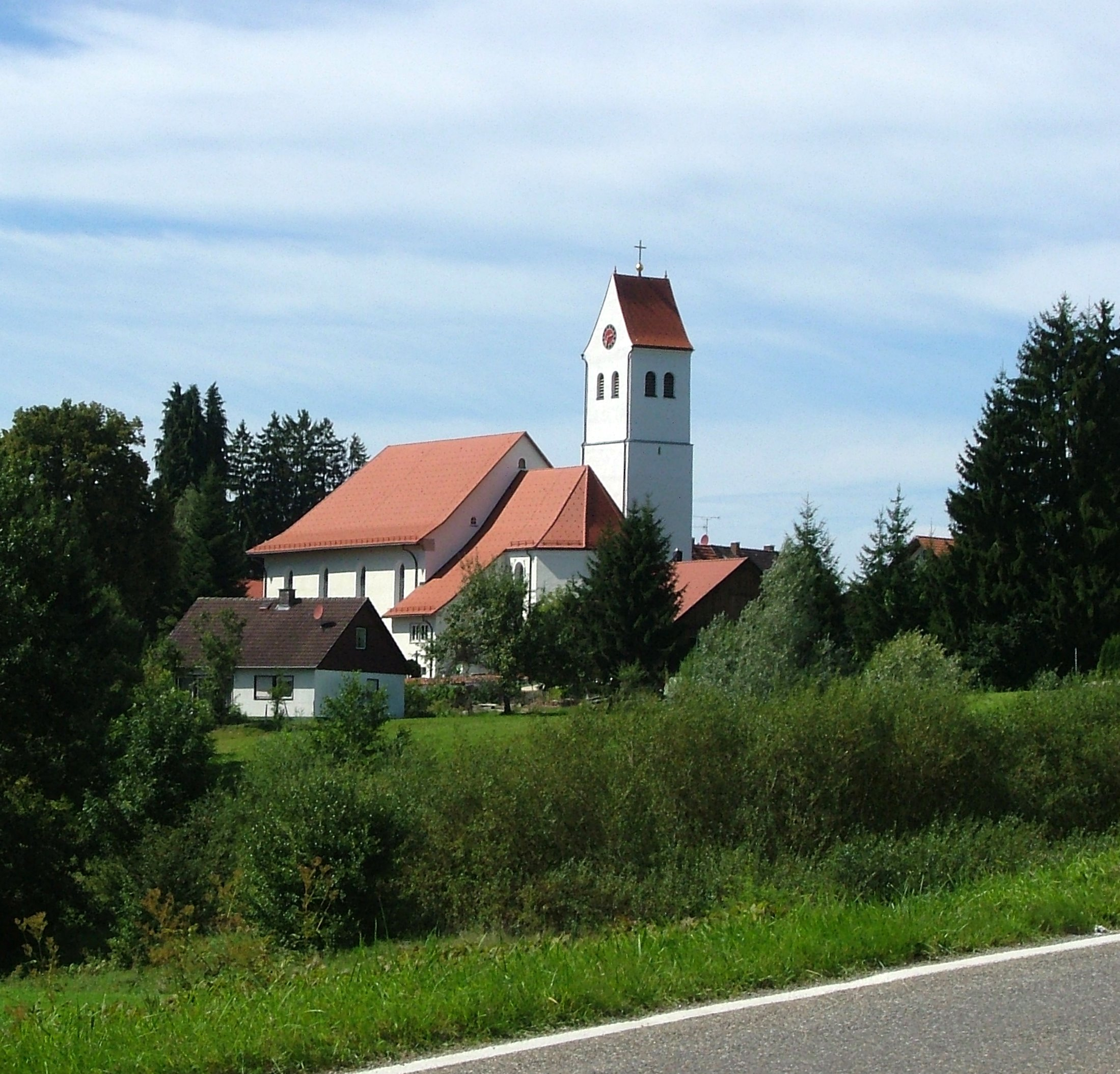 Wohmbrechts